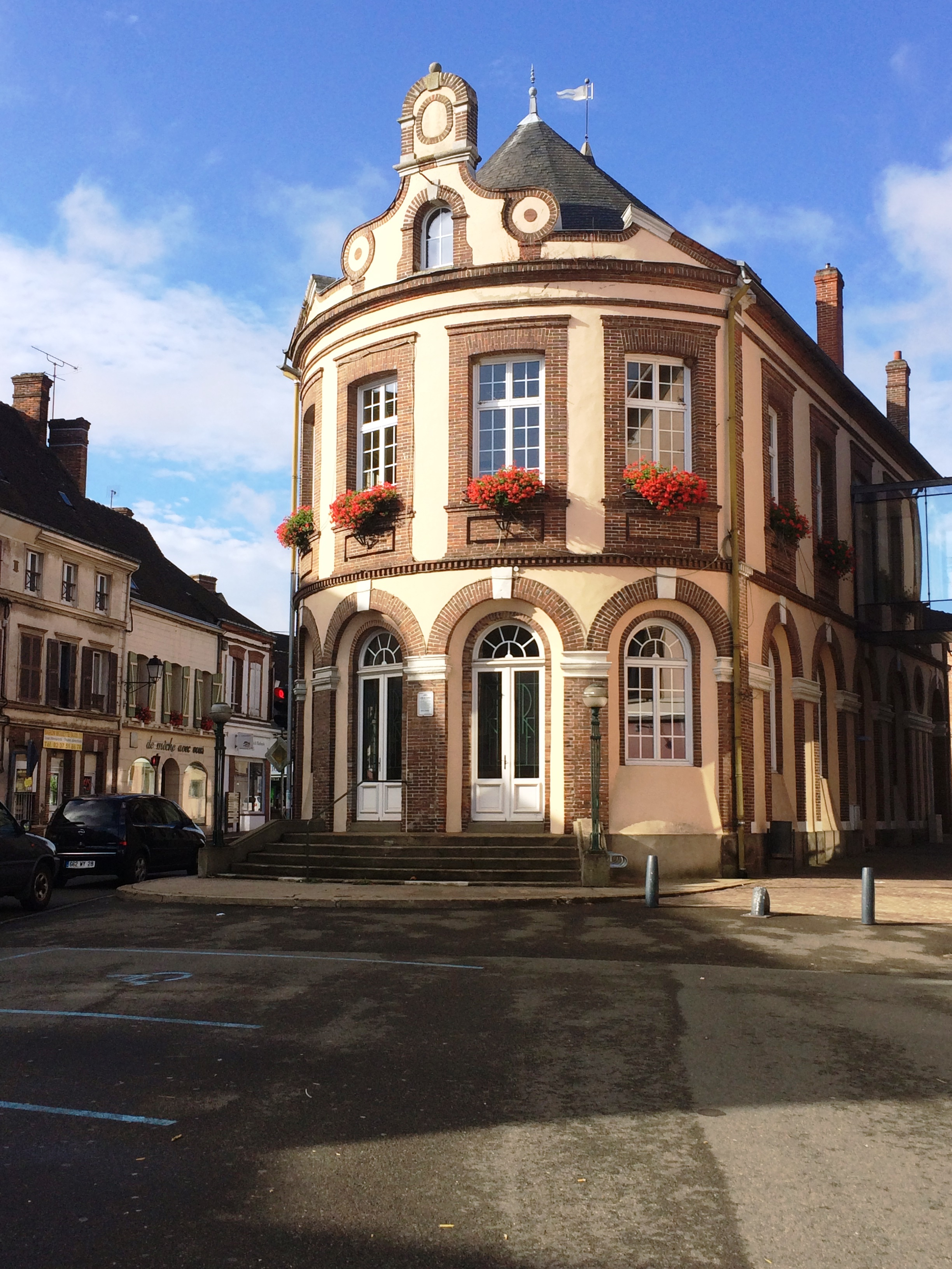 Chateauneuf-en-Thymerais - Mairie